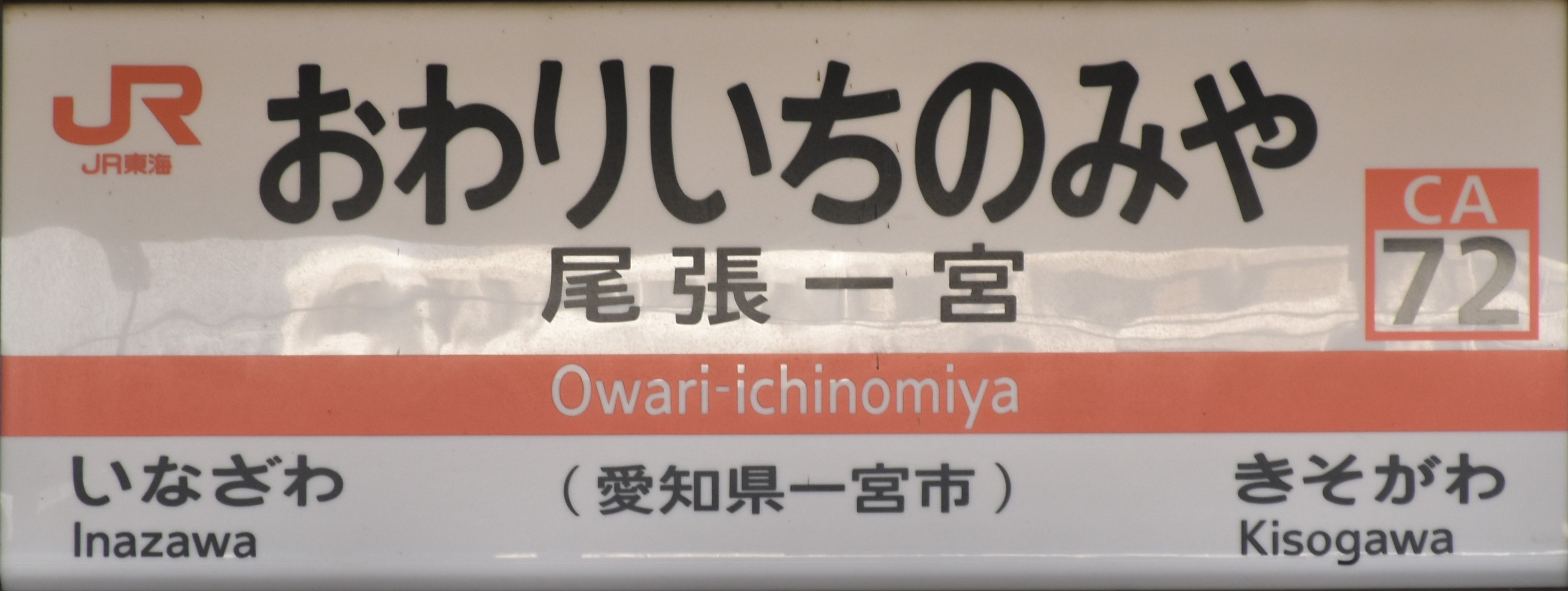 尾張一宮駅の駅名標。